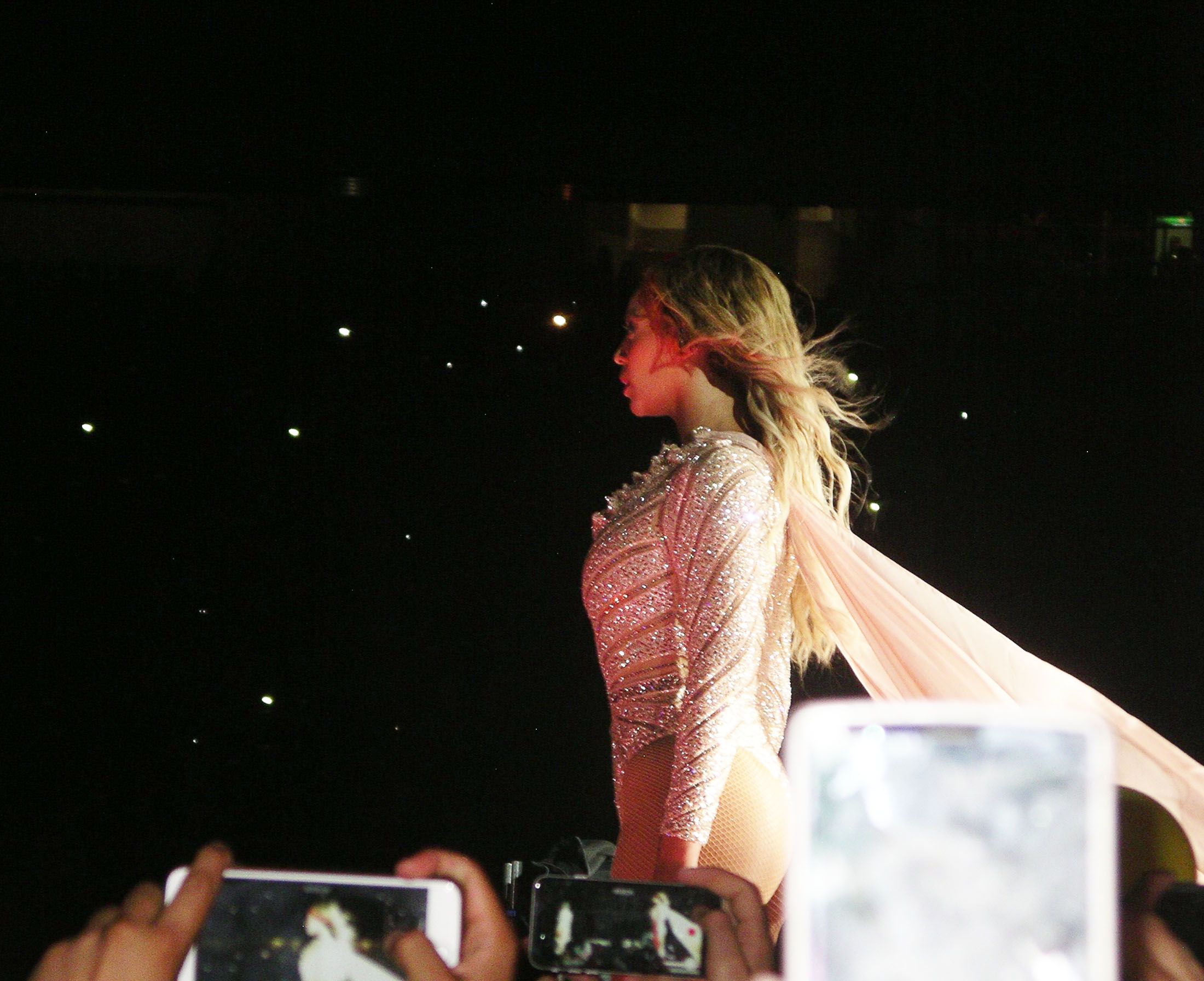 Beyonce durante un show en el estadio San Siro en Milan